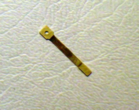 Metala anĉeto, kiu igas la tonon en la harmoniumo.